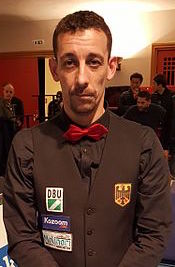 Dreibandspieler Ronny Lindemann